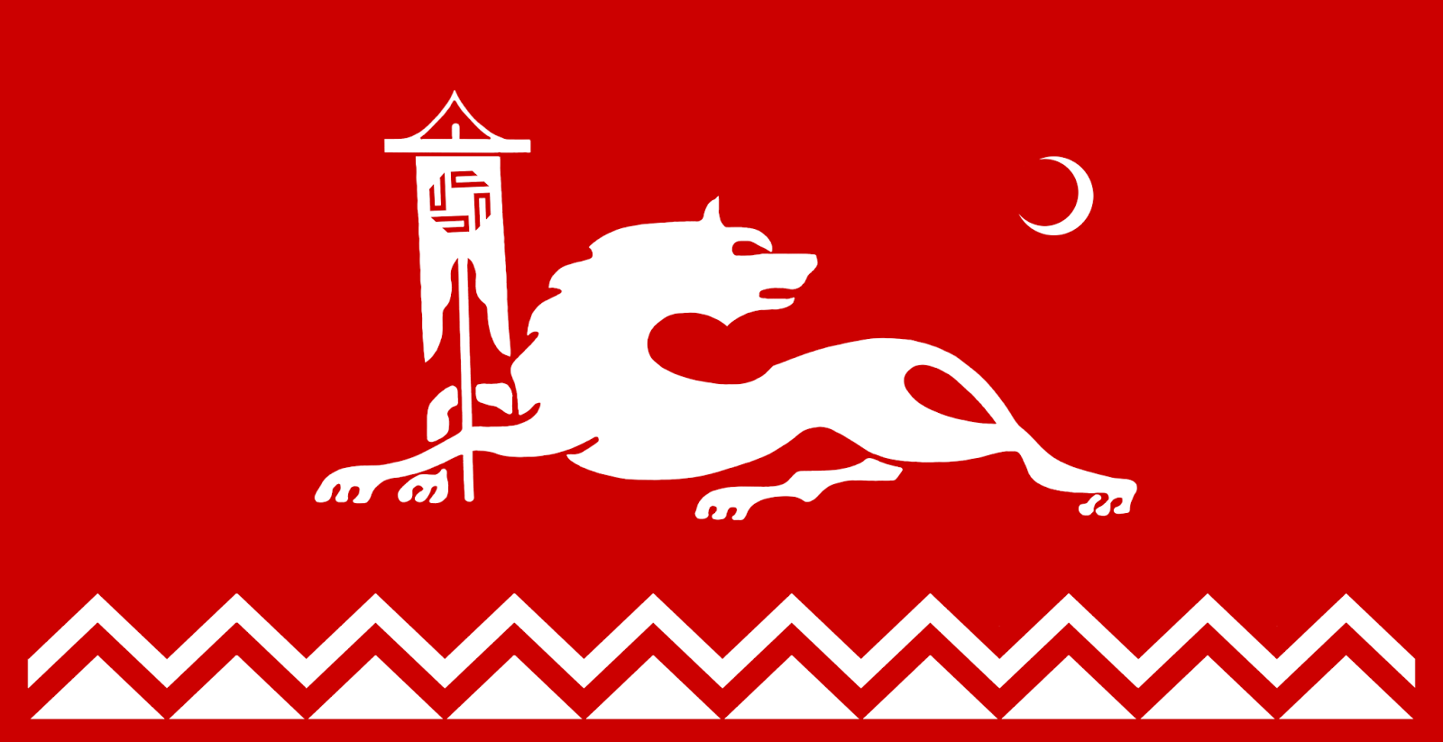 Волк со штандартом символ аварских нуцалов по Вахушти Багратиони_"История царства Грузинского". 30-е годы 18 века. Стилизованное изображение волка со штандартом родовое знамя аварских ханов